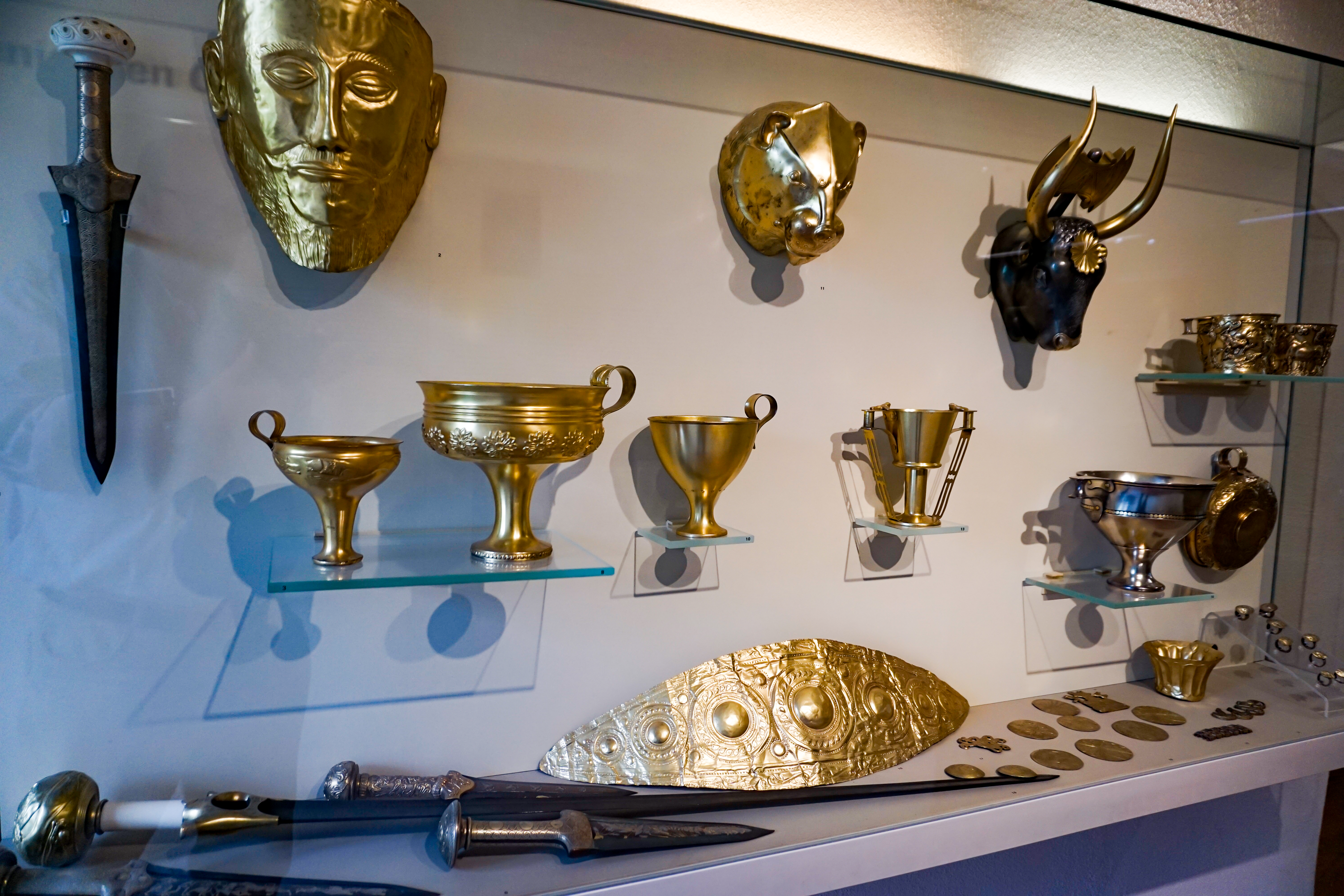 MUT: Museum der Universität Tübingen - Alte Kulturen - Sammlungen im Schloss Hohentübingen - Galvanoplastische Nachbildungen mykenischer Kunst. Originale alle im Archäologischen Nationalmuseum Athen. Galvanoplastische Kunstanstalt der WMF